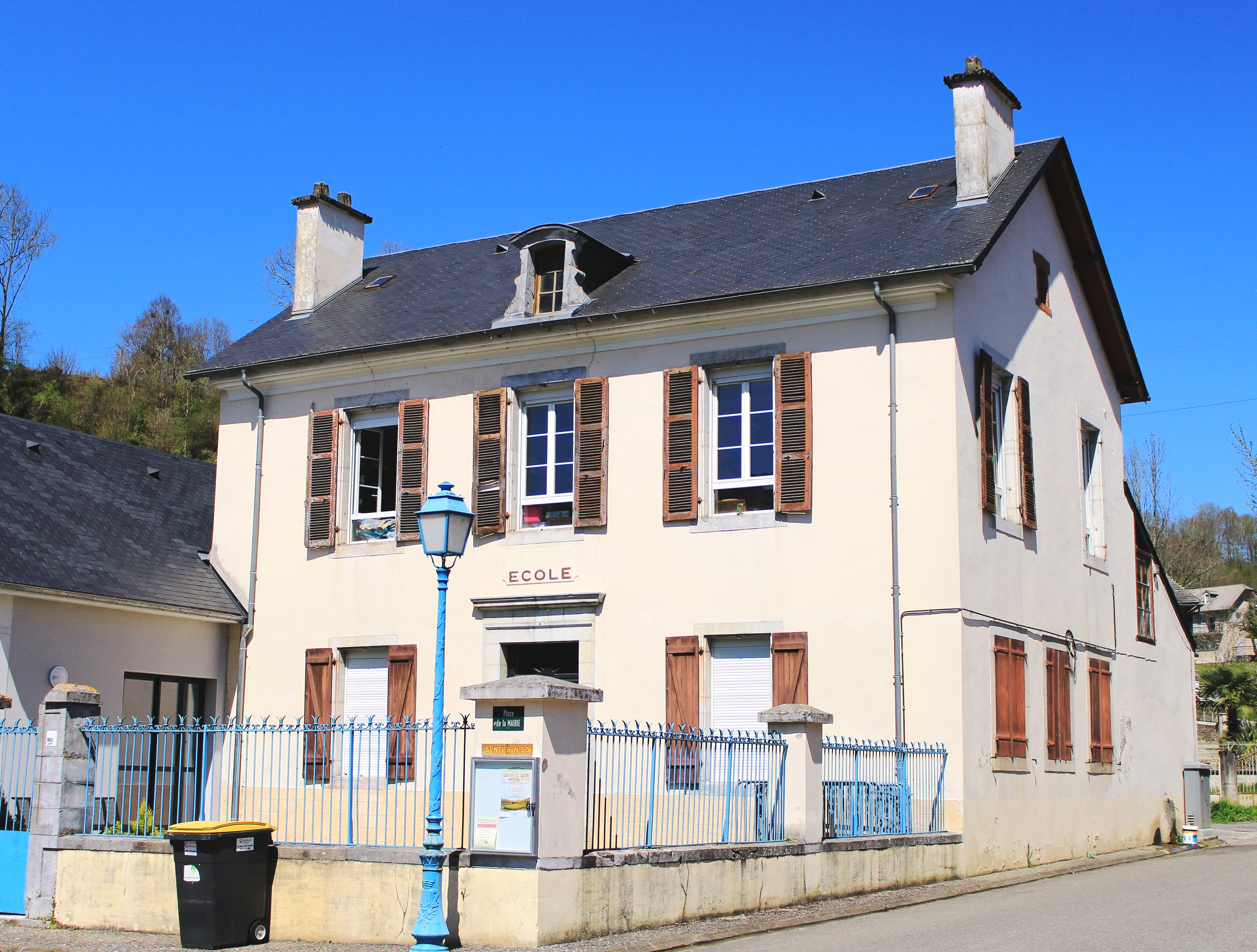 École de Peyrouse (Hautes-Pyrénées)